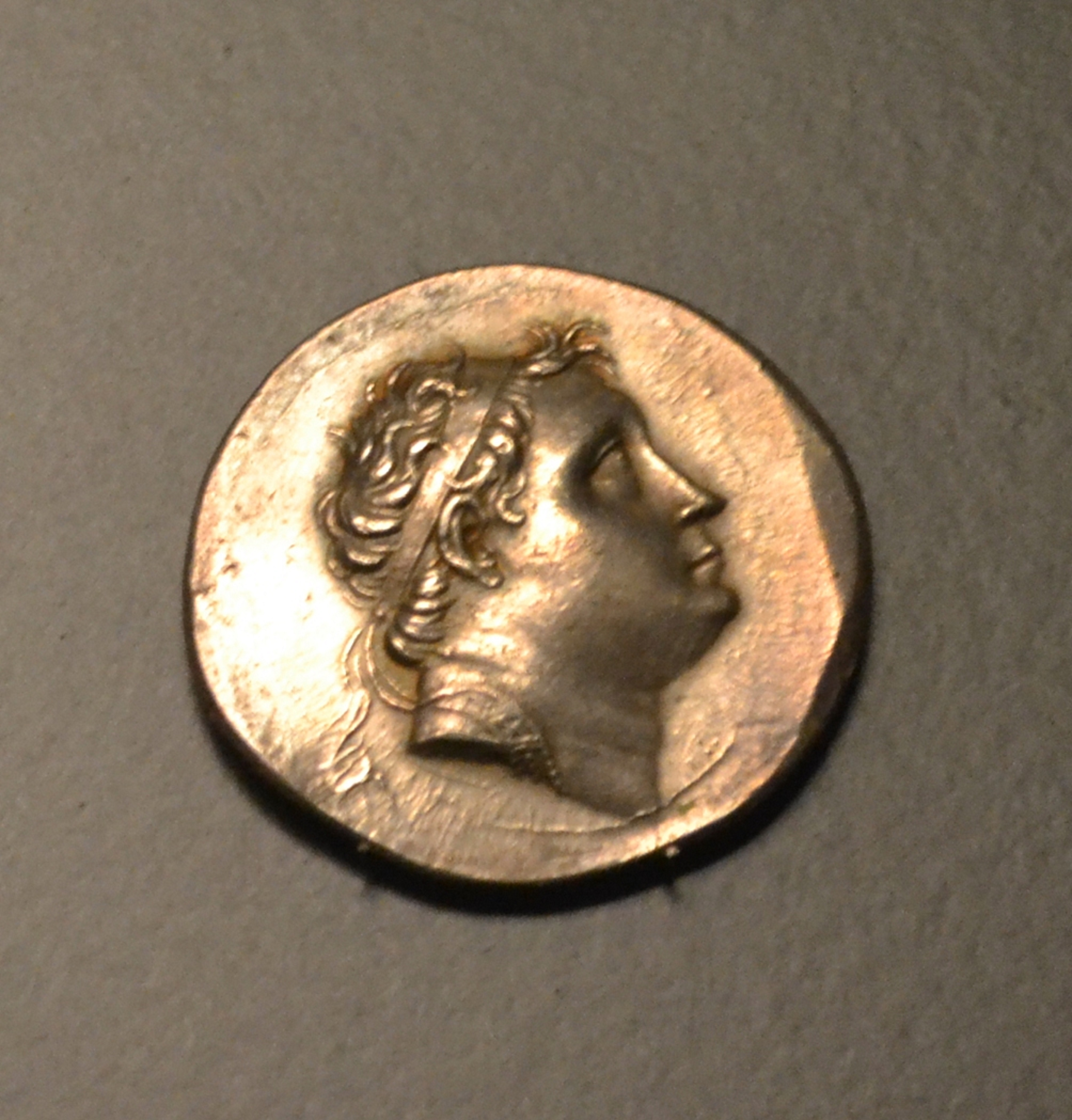 Tetradracma de Nicomedes II. Bitinia. 127-94 a. C. Museo de Prehistoria de Valencia.